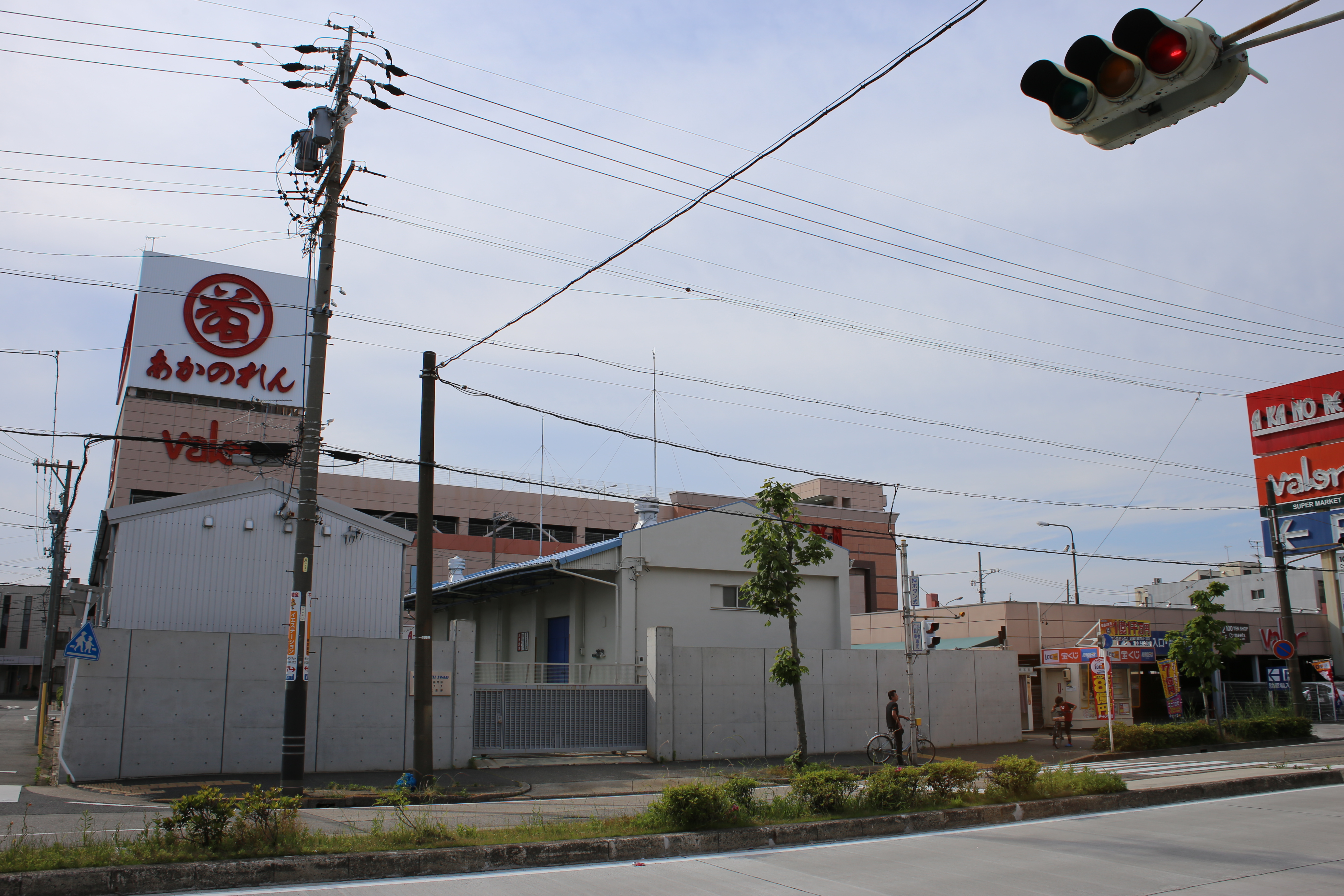 名古屋市南区明治一丁目のあかのれん内田橋店を東側公道南側より撮影